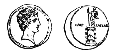 Denier d'Octavien, peut-être émis à Rome entre 30 et 29 av. J.-C. - Avers : tête d'Octavien avec couronne de laurier - Revers : Colonne rostrale surmontée d'une statue d'Octavien nu portant un manteau et tenant une haste et une épée, avec inscription IMP[ERATOR] CAESAR